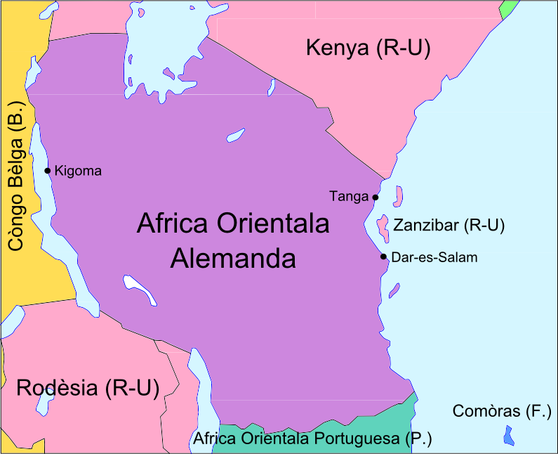 Africa Orientala Alemanda en 1914.